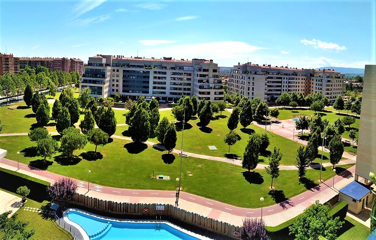 Es una foto de un barrio del sur